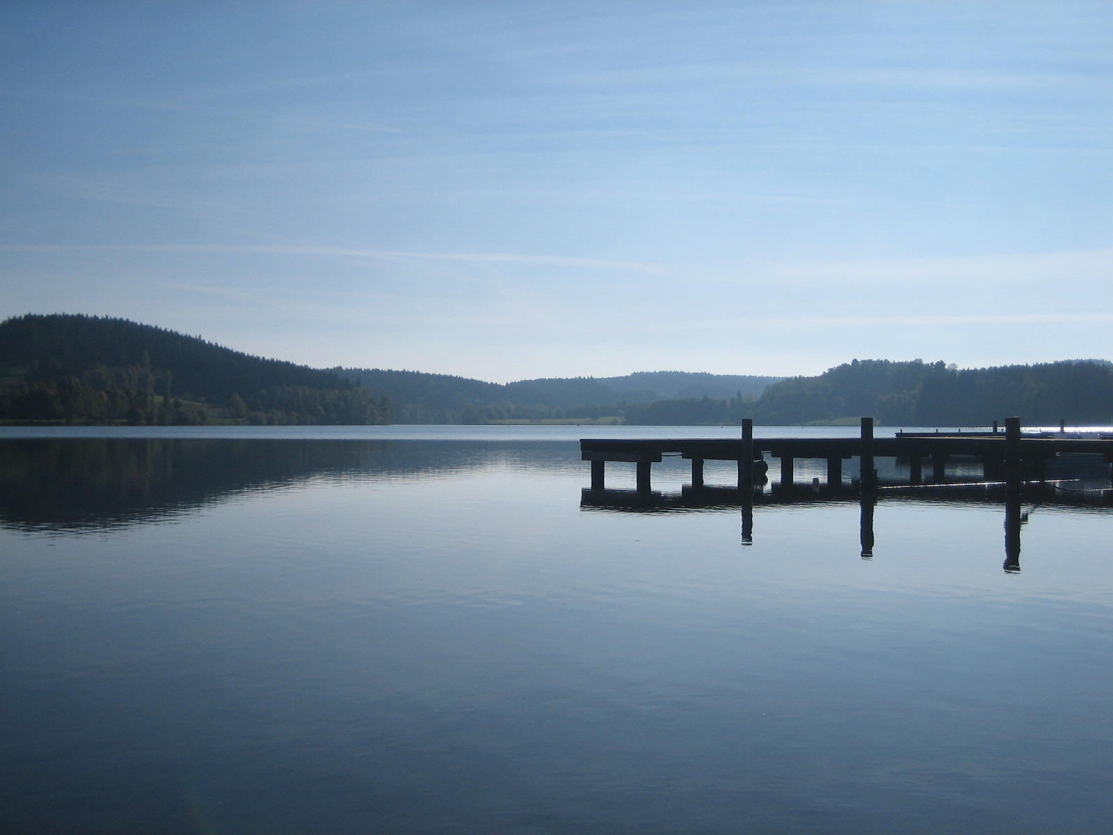 Am Untreusee